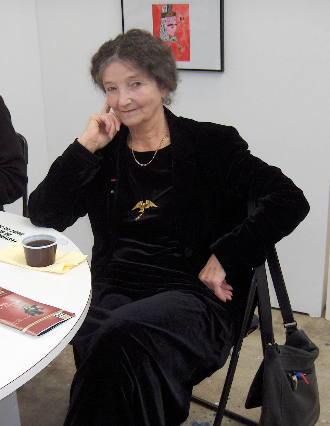 La femme de lettres et chanteuse occitane Marie Rouanet au Festival international de géographie (FIG) de Saint-Dié des Vosges